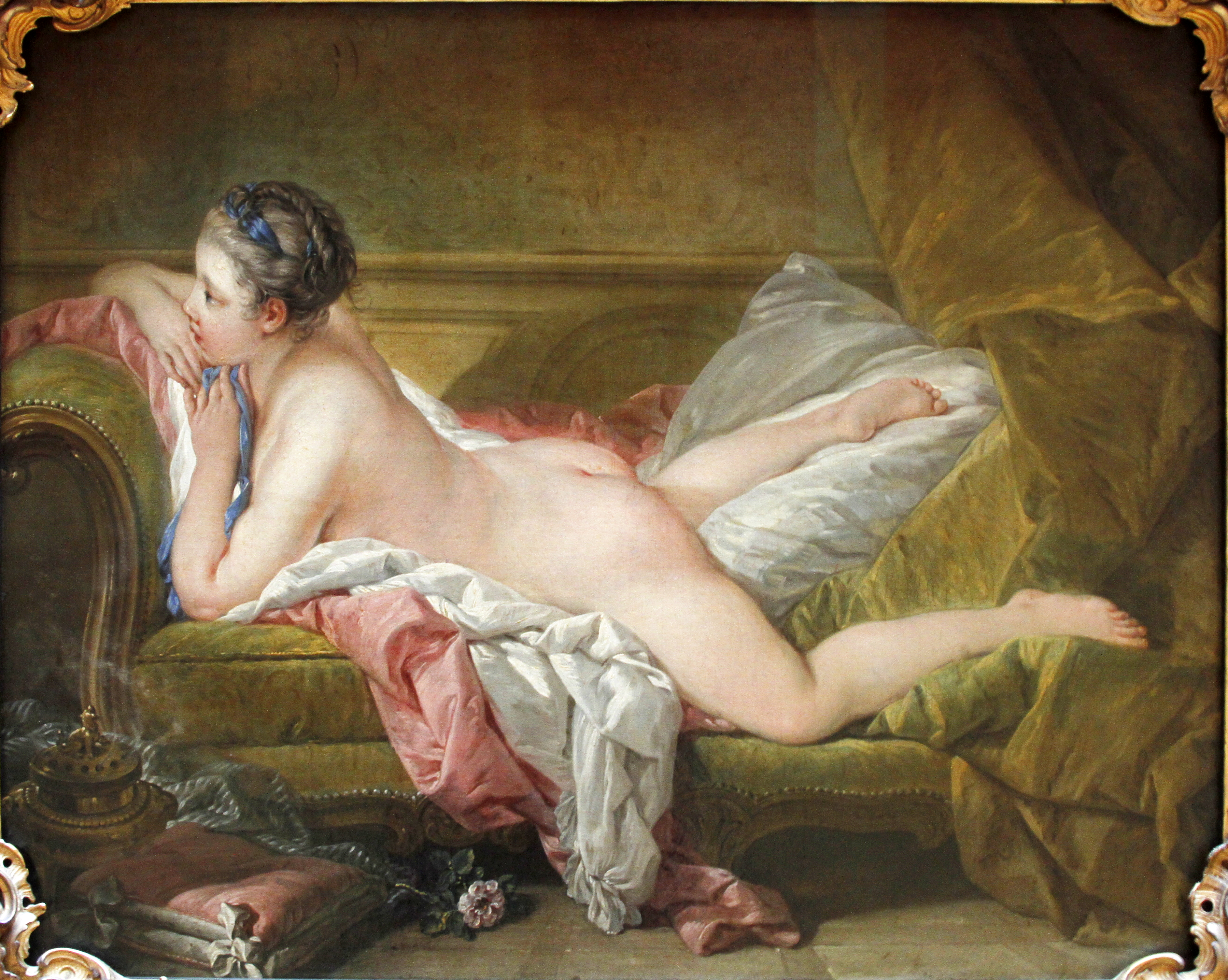 Alte Pinakothek - Munich - Germany